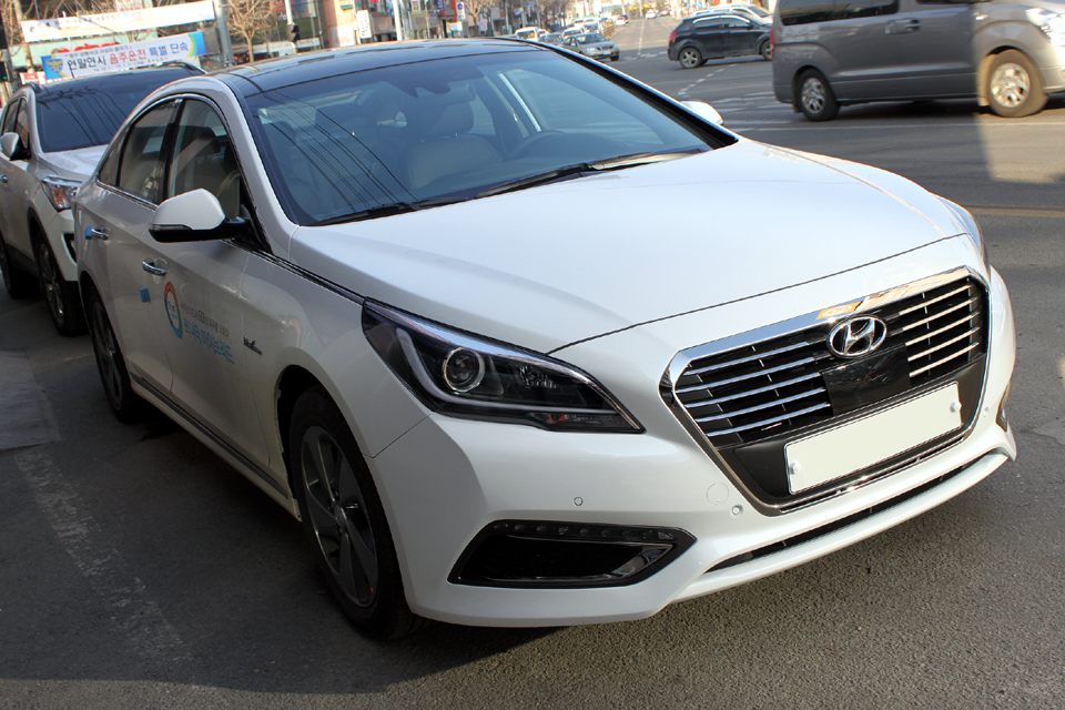 현대 쏘나타 하이브리드